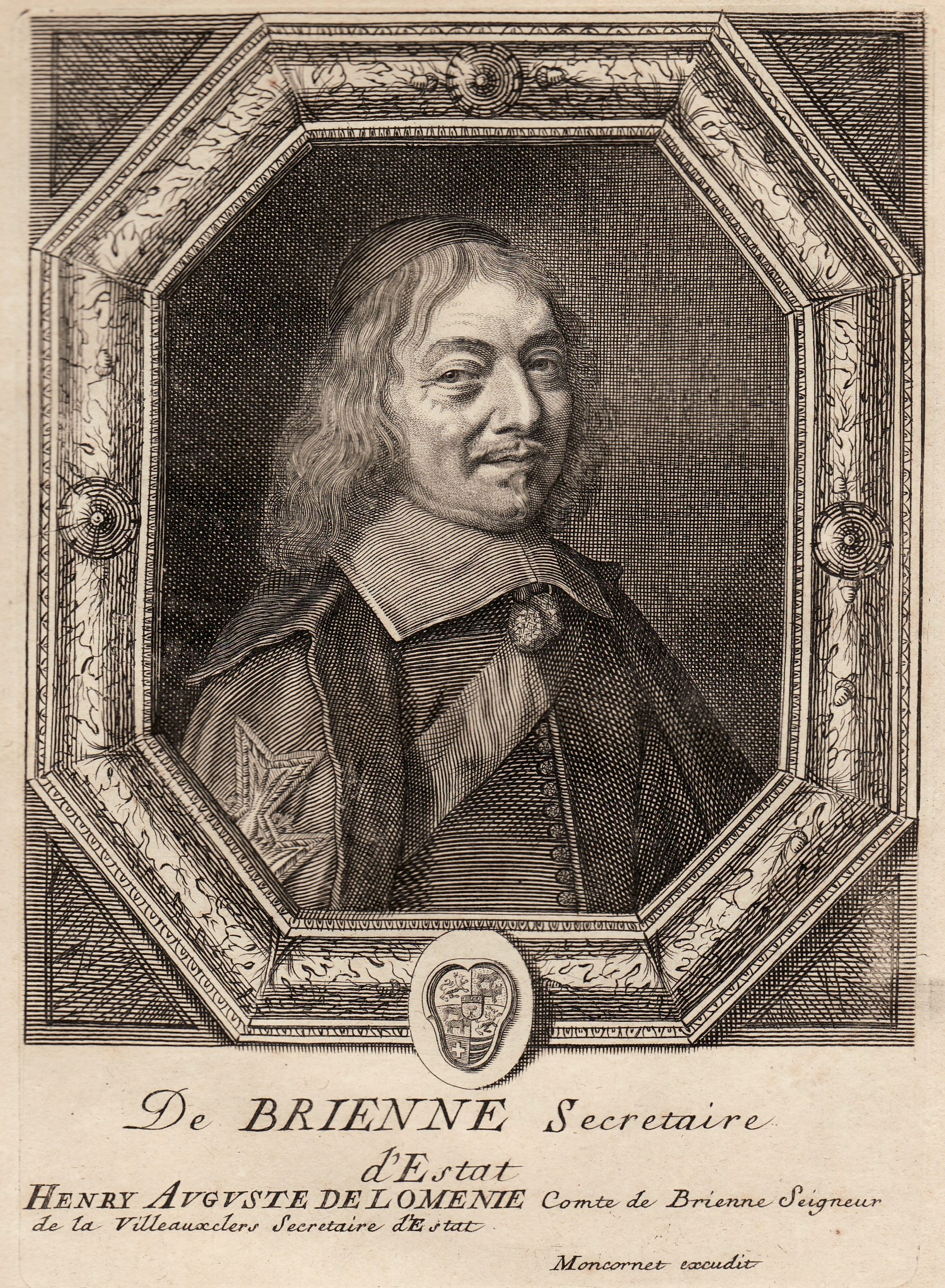 Henri-Auguste de Loménie de Brienne, secrétaire d'Etat. Gravure de Balthazar Moncornet, 1643-1663